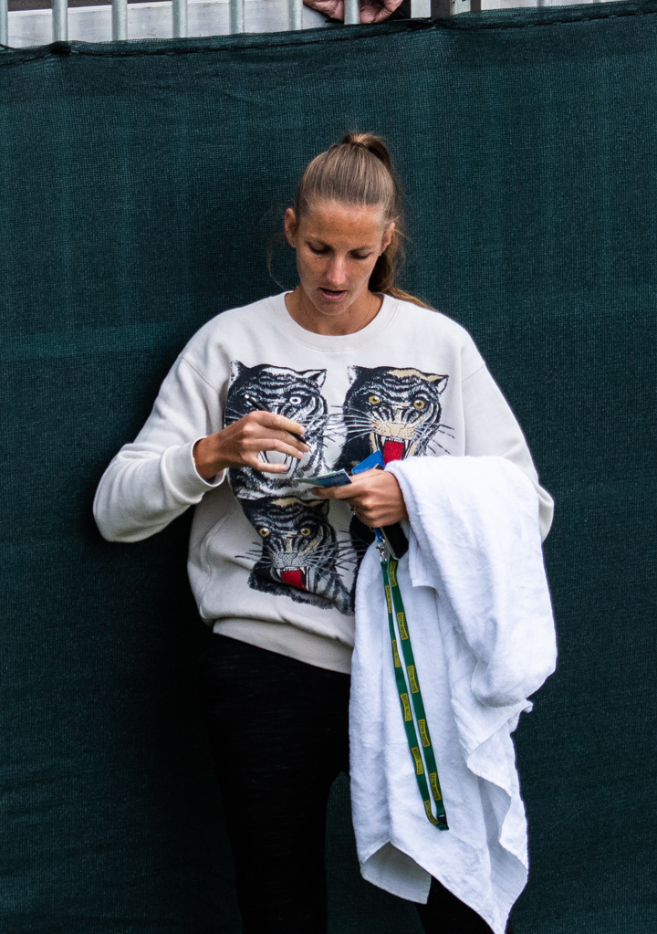 Karolina Pliskova